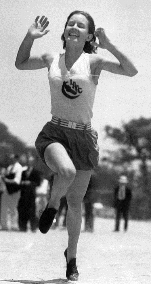 Arrivée de Evelyn Furtsch, athlète américain, à la course des 200 mètres, à Pasadena, Californie, Etats-Unis le 20 juin 1932